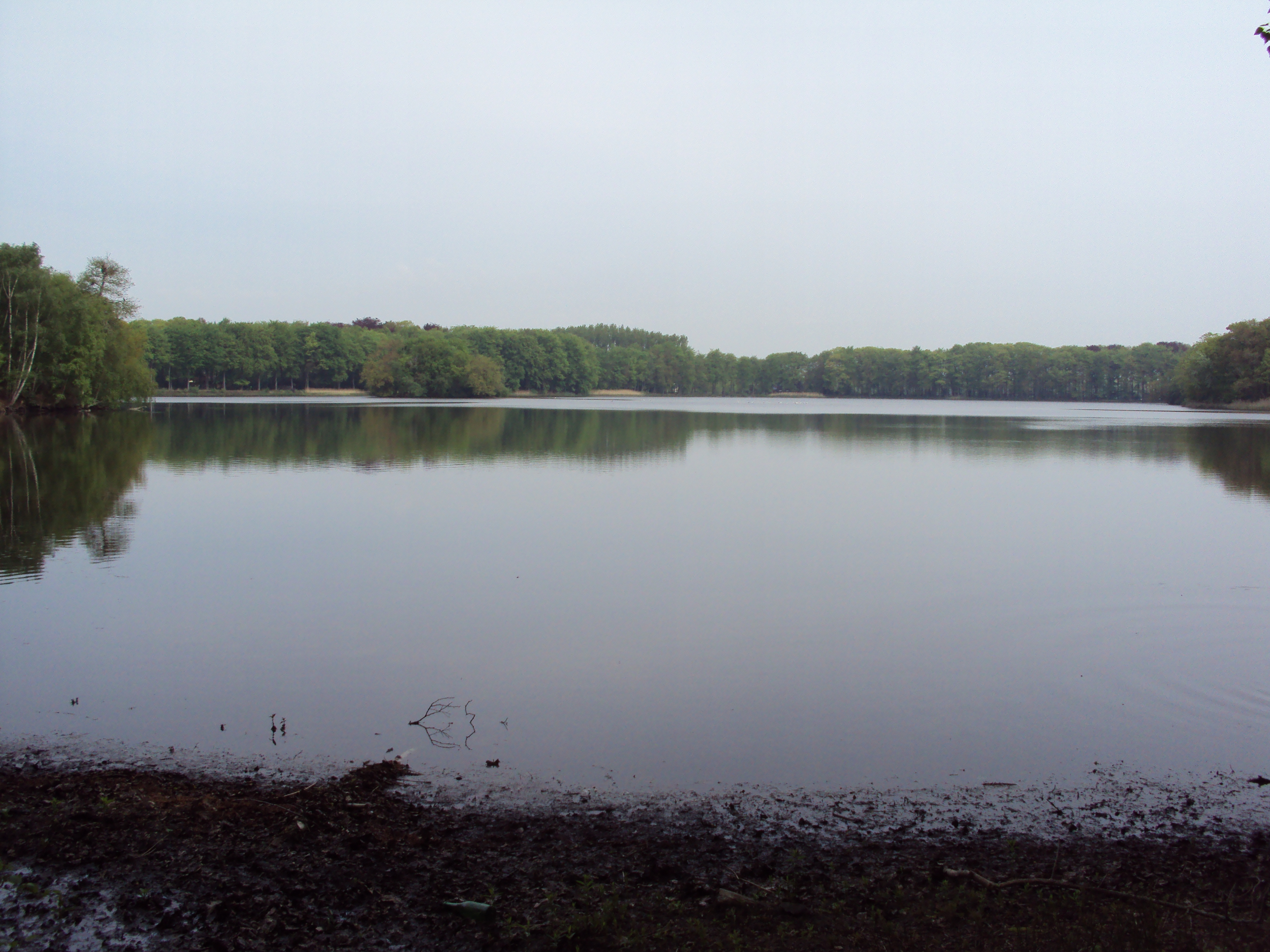 Kraenepoel in Aalter (dd. 16 mei 2010)